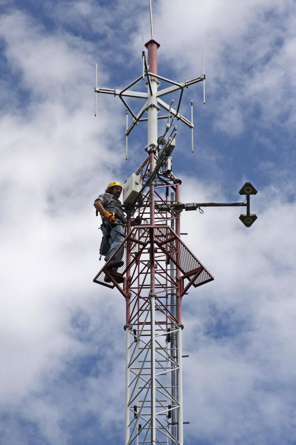 Photo de SIRTA à l'École polytechnique